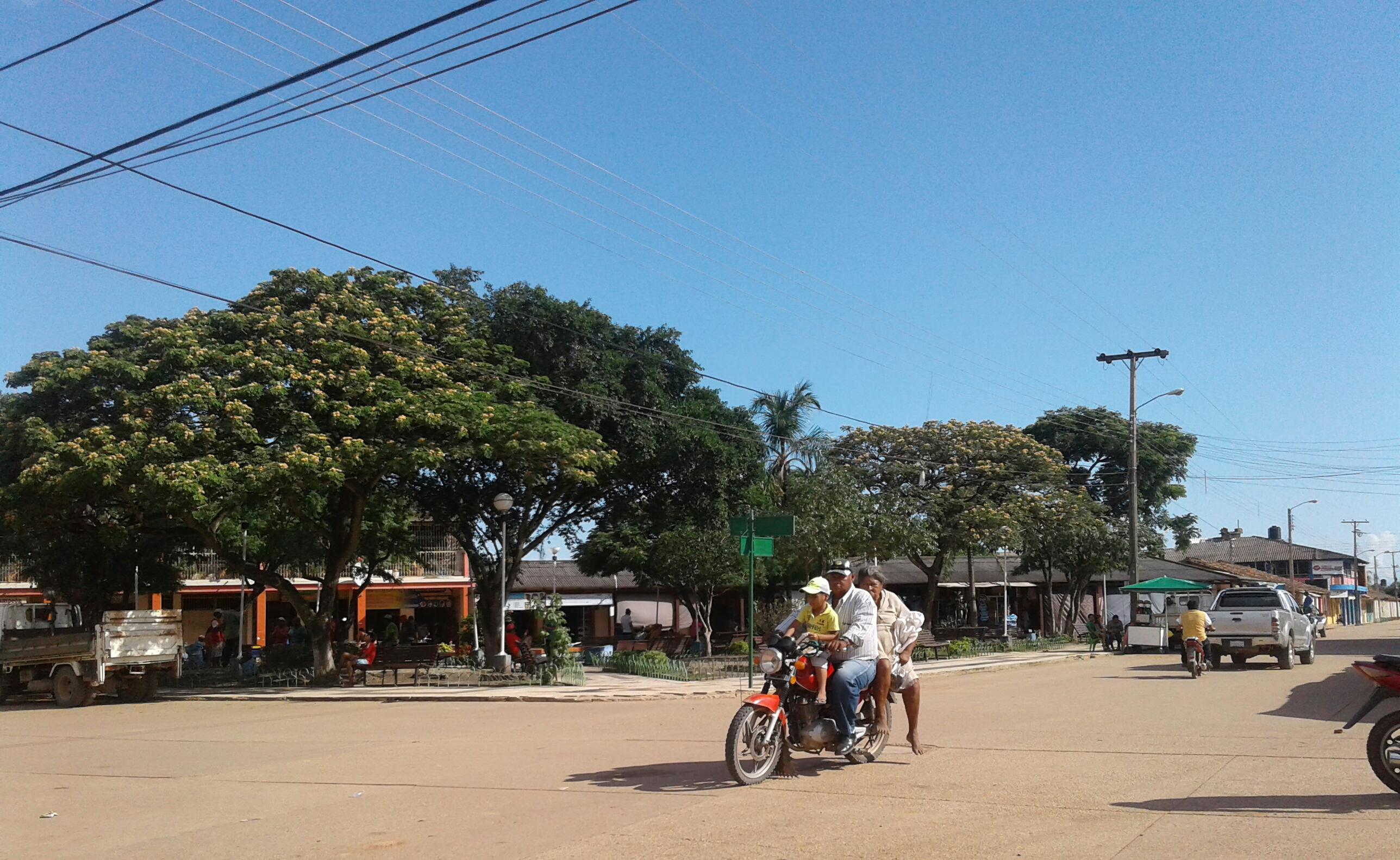 Parque Triangular Santa Ana Del Yacuma.